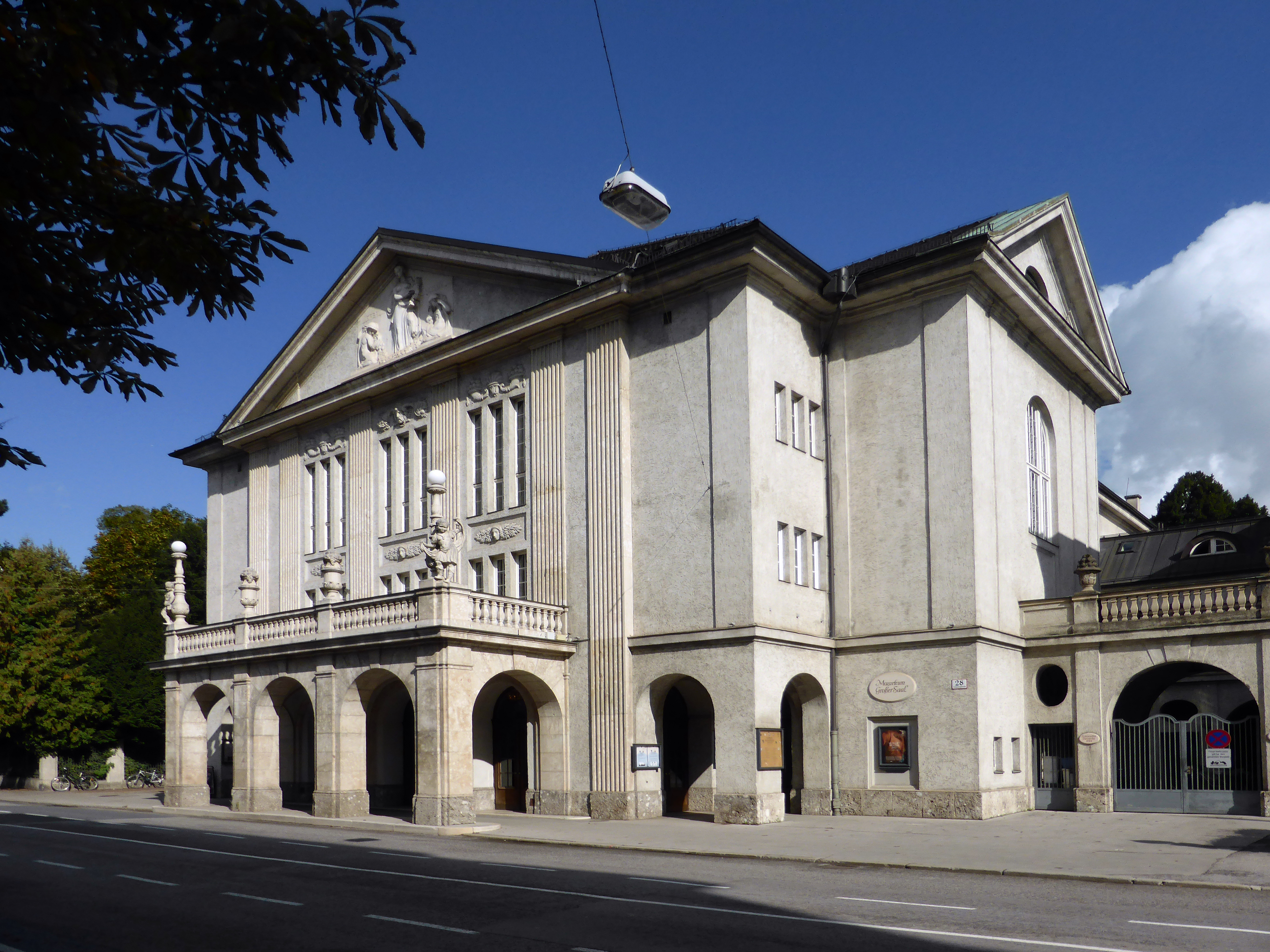 Großer Saal - Internationale Stiftung Mozarteum Schwarzstraße 28, Salzburg.